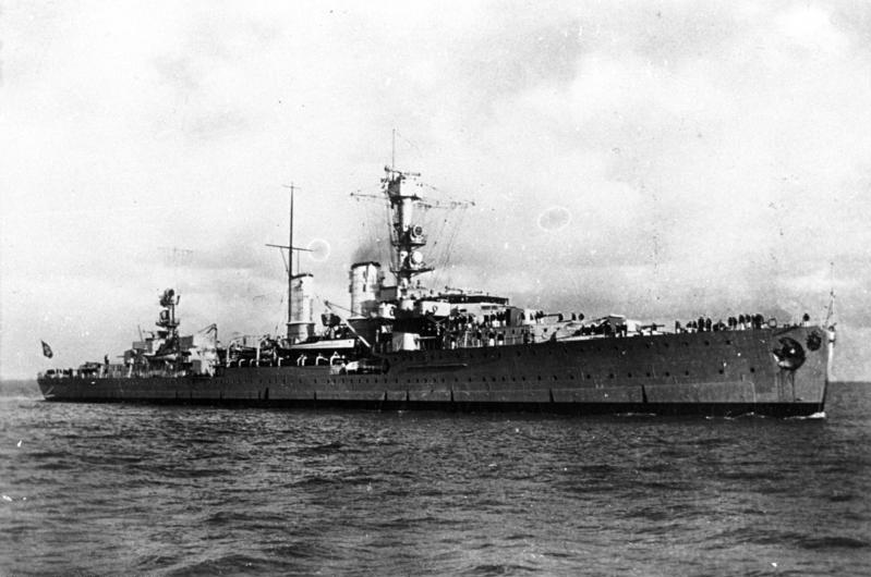 Leichter Kreuzer "Emden" Leichter Kreuzer "Emden" III in See. Ansicht der Steuerbordseite